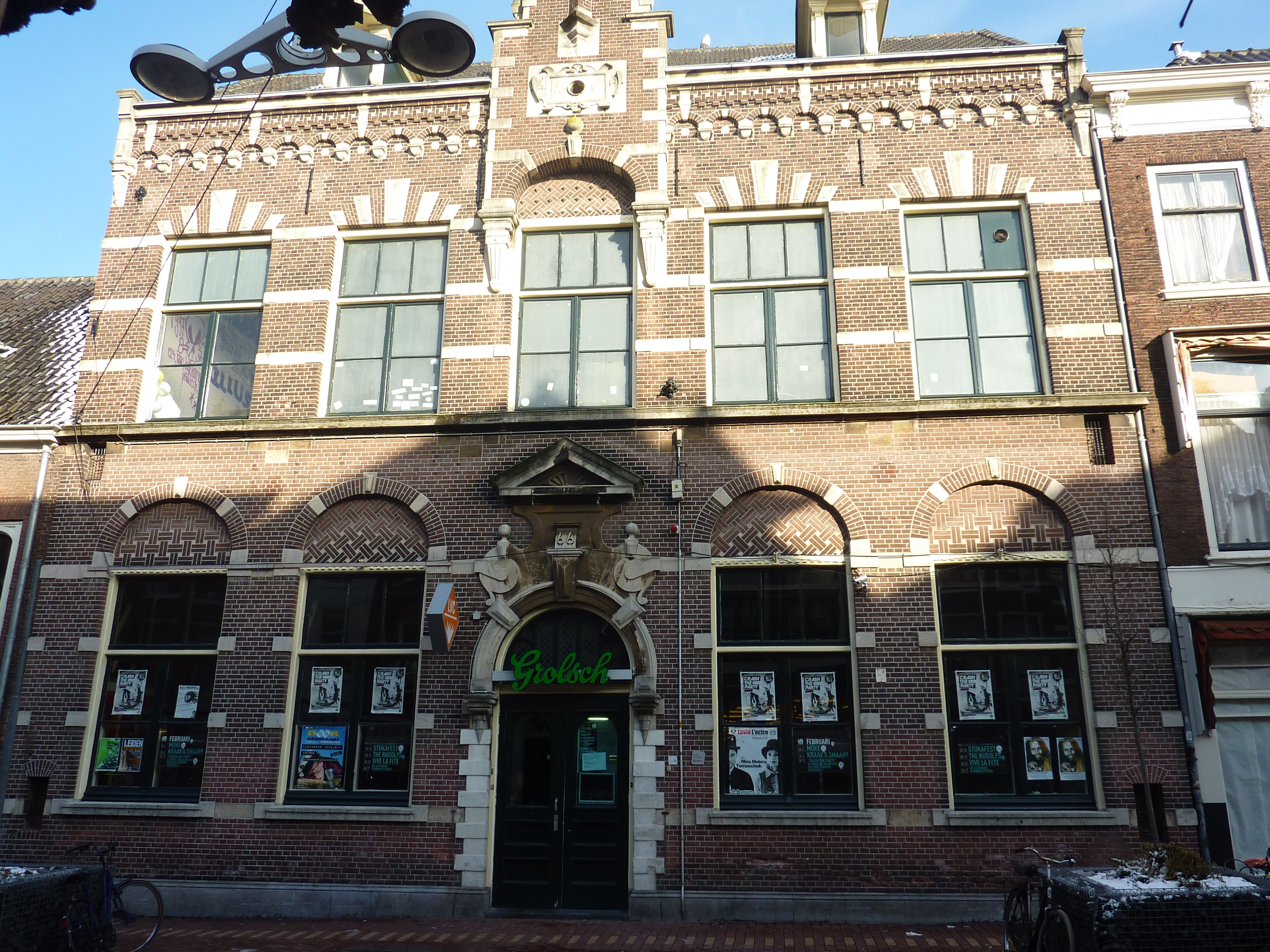 Leiden - Breestraat 66